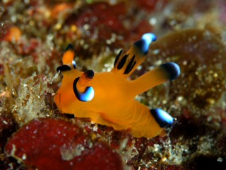 Thecacera pacifica a 21 m, en el Parque Marino de Izu, Japón